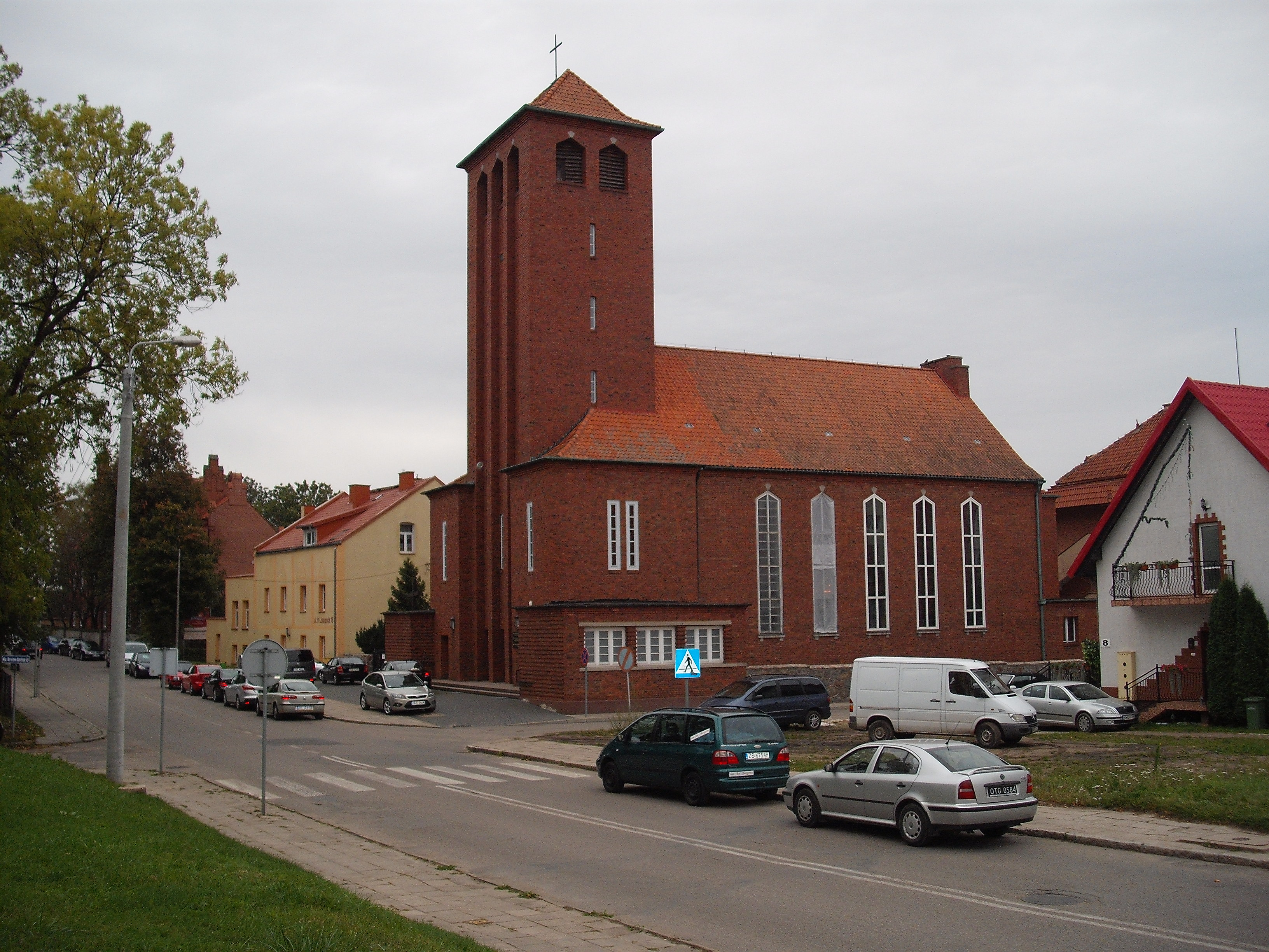 Węgorzewo, ul. 11 Listopada 14 - dawny kościół ewangelicki pw. Św. Krzyża, obecnie cerkiew greckokatolicka (1930-1933)